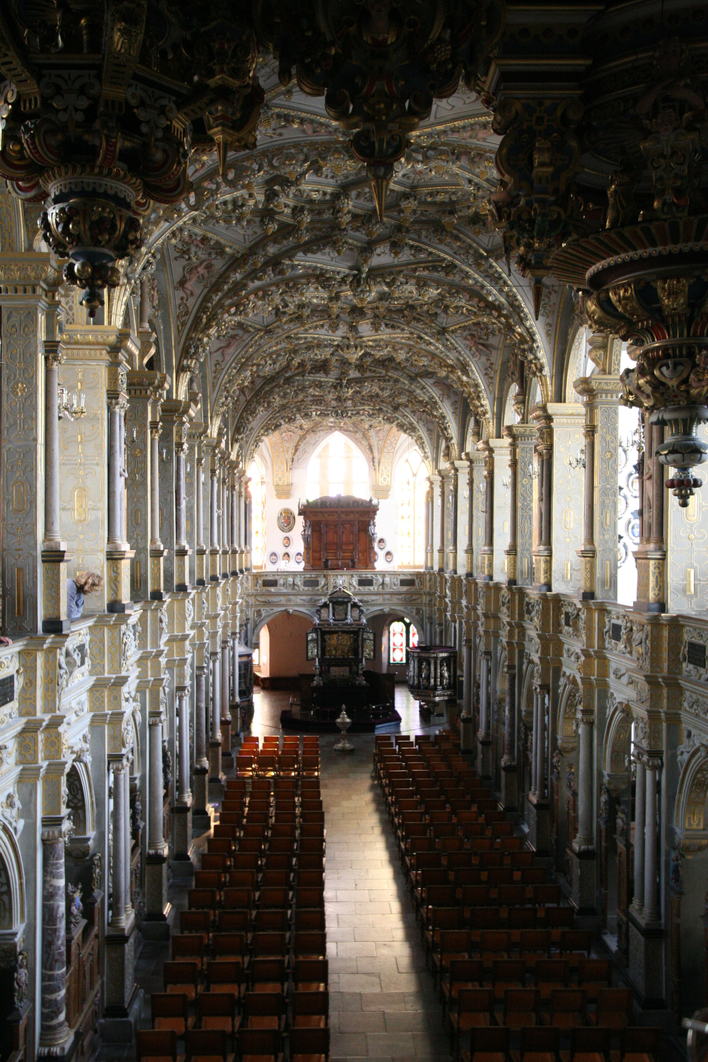 Frederiksborg Slotkirke, Hillerød, Denmark. Interior seen from the queens prayerchamber. Portrait format, wide angle.